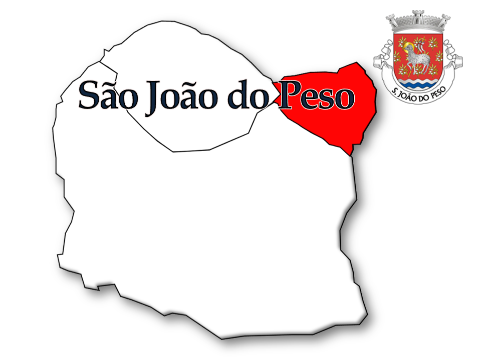 Evolução da População